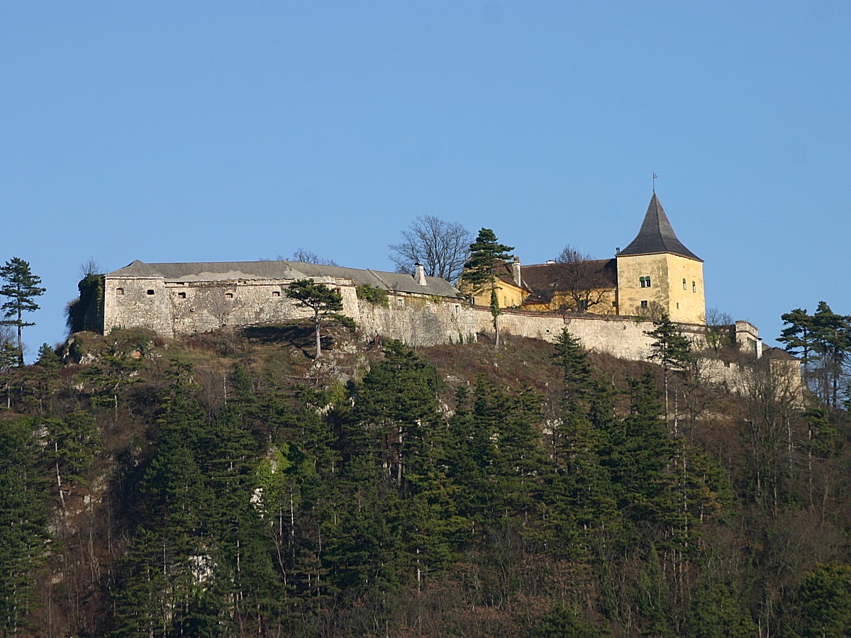 Pitten Schloss (Bild 1)